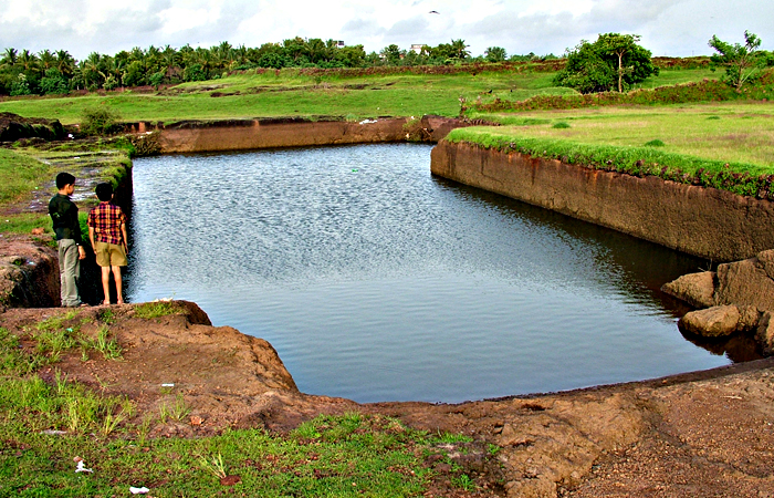 നാരേൻ കുളം, പൂച്ചോലമാട്